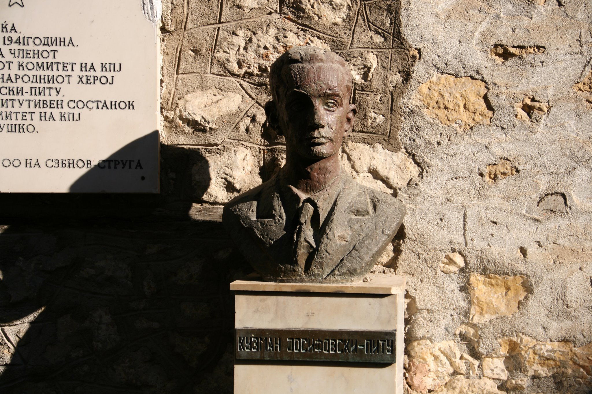 Kuzman Josifovski - Pitu -- Struga